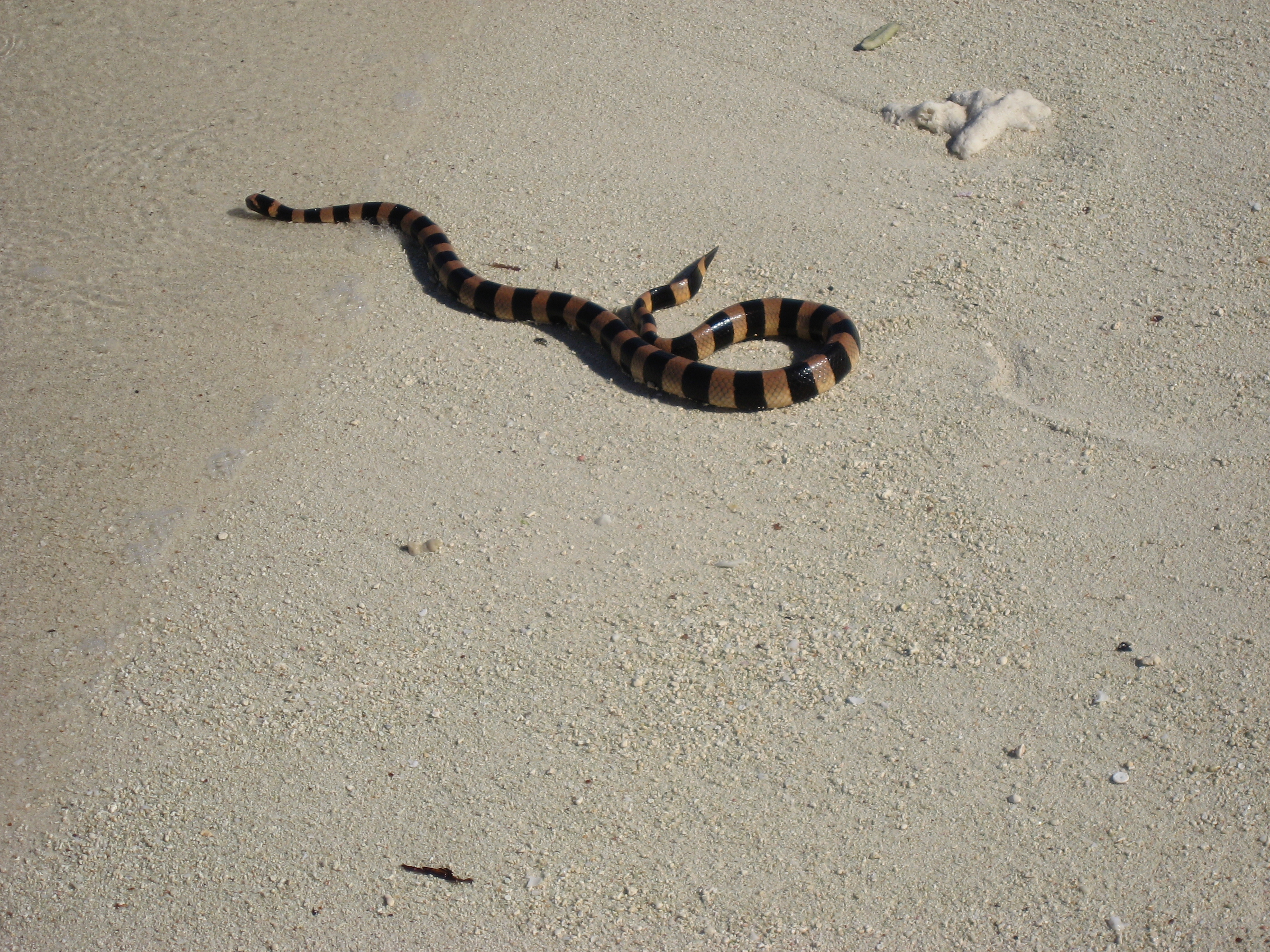 photo prise sur l'ilot du phare amédée - Nouvelle Calédonie